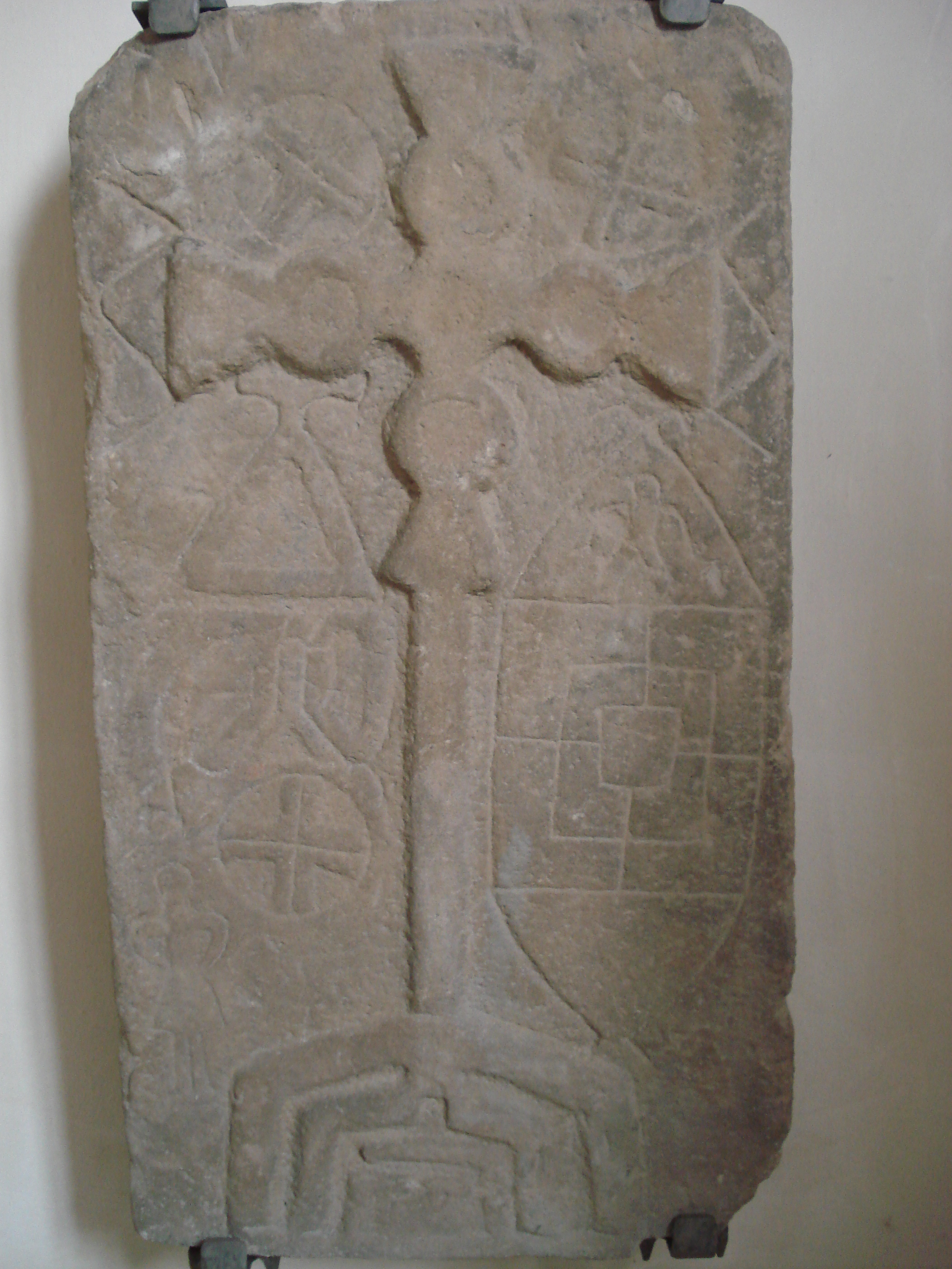 Der 1958 gefundene Grabstein